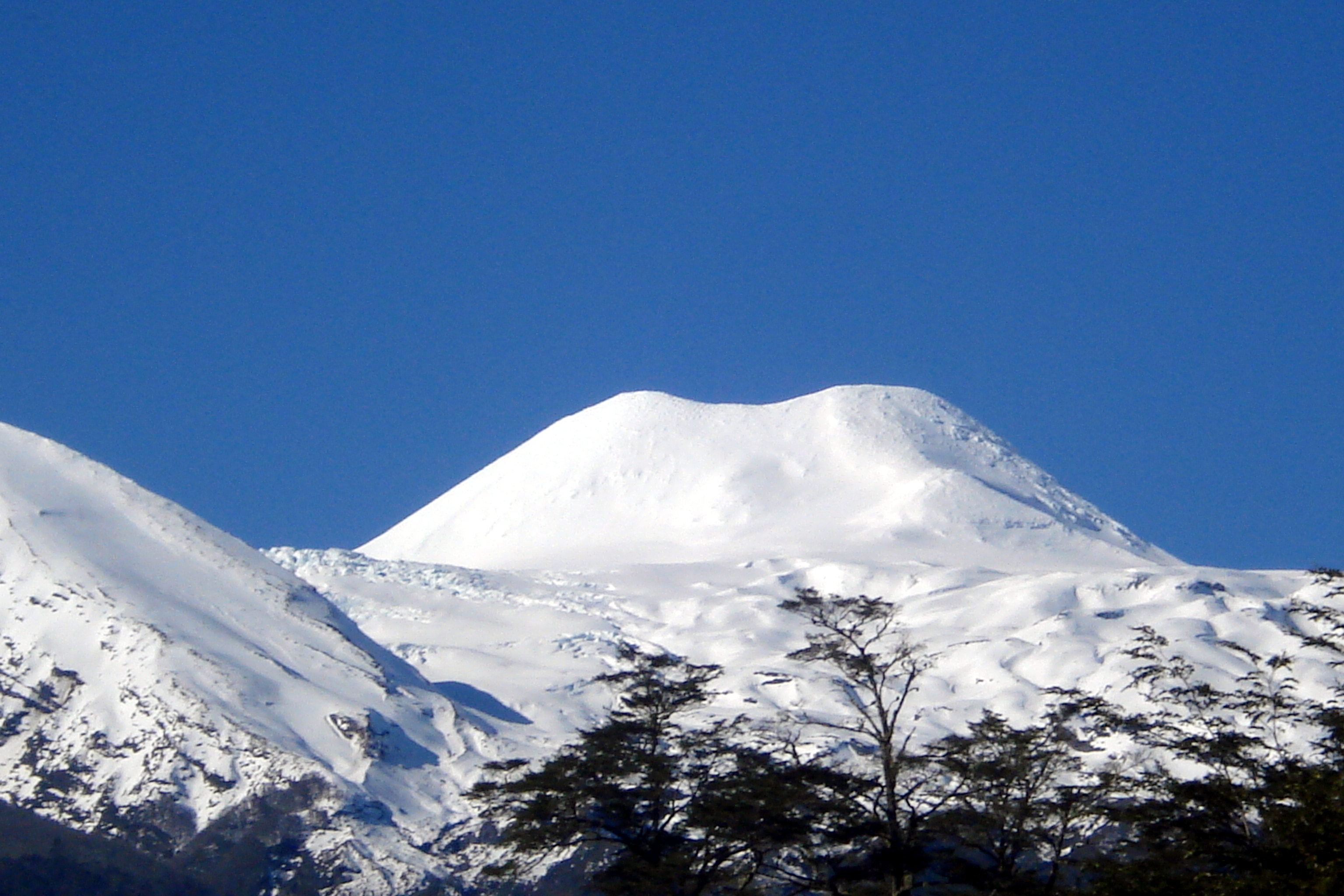 Cumbre del volcán Mocho.